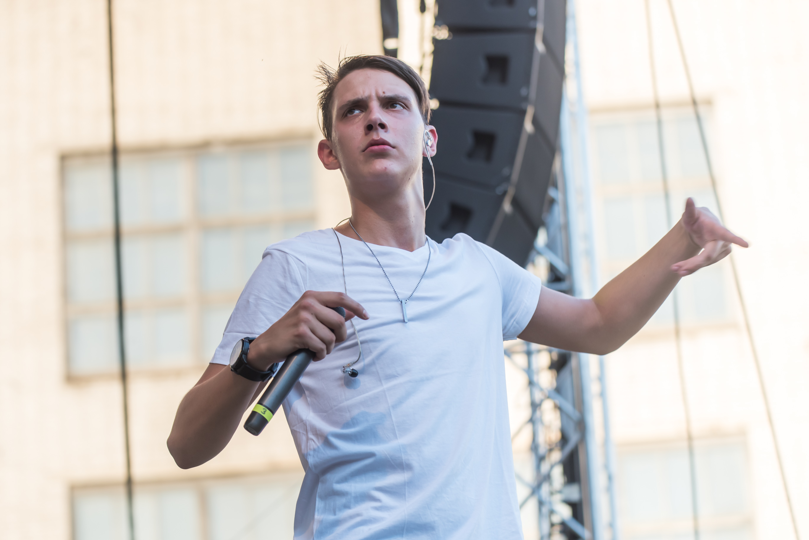 Тима Белорусских на Slime&Play Fest